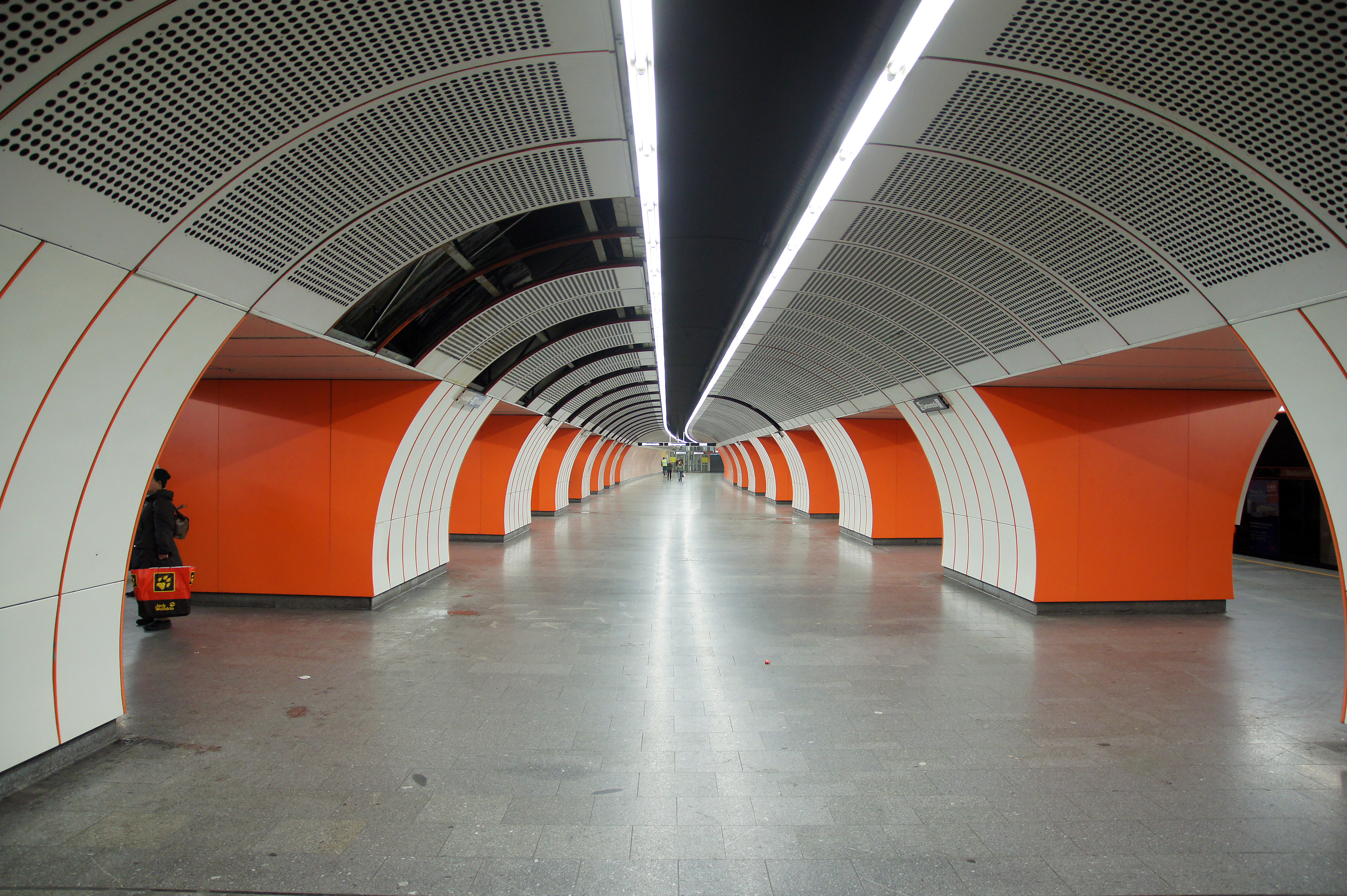 U3-Station Westbahnhof, Wien